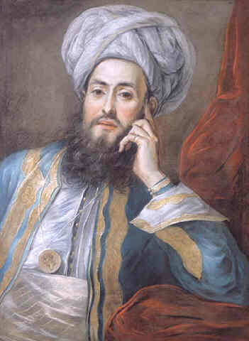 Said Effendi in Paris in 1742